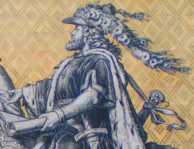 Dresdener Fürstenzug - Heinrich der Erlauchte